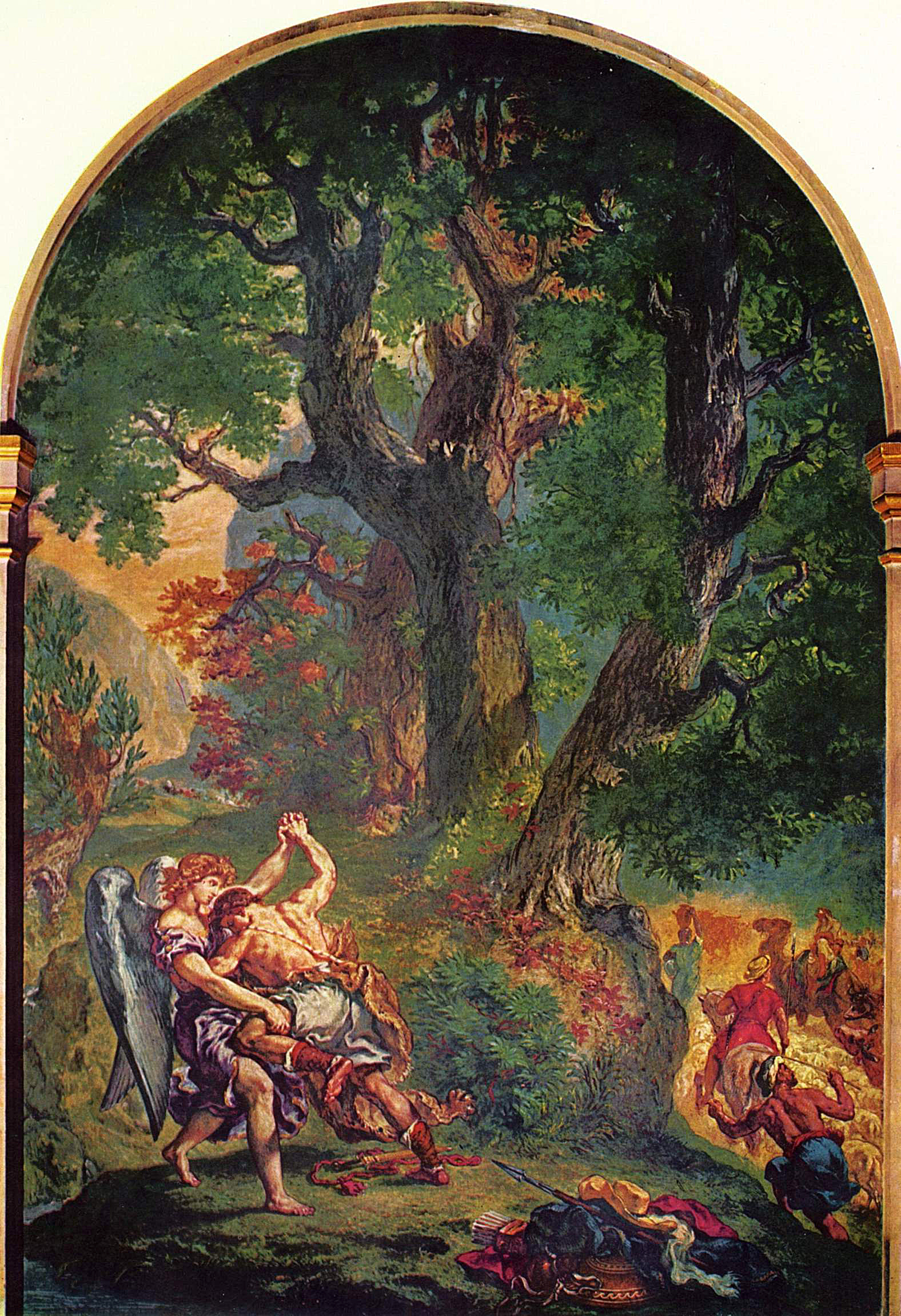 Wandgemälde für Saint-Sulpice in Paris, Kapelle der Heiligen Engel, Szene: Jakobs Kampf mit dem Engel